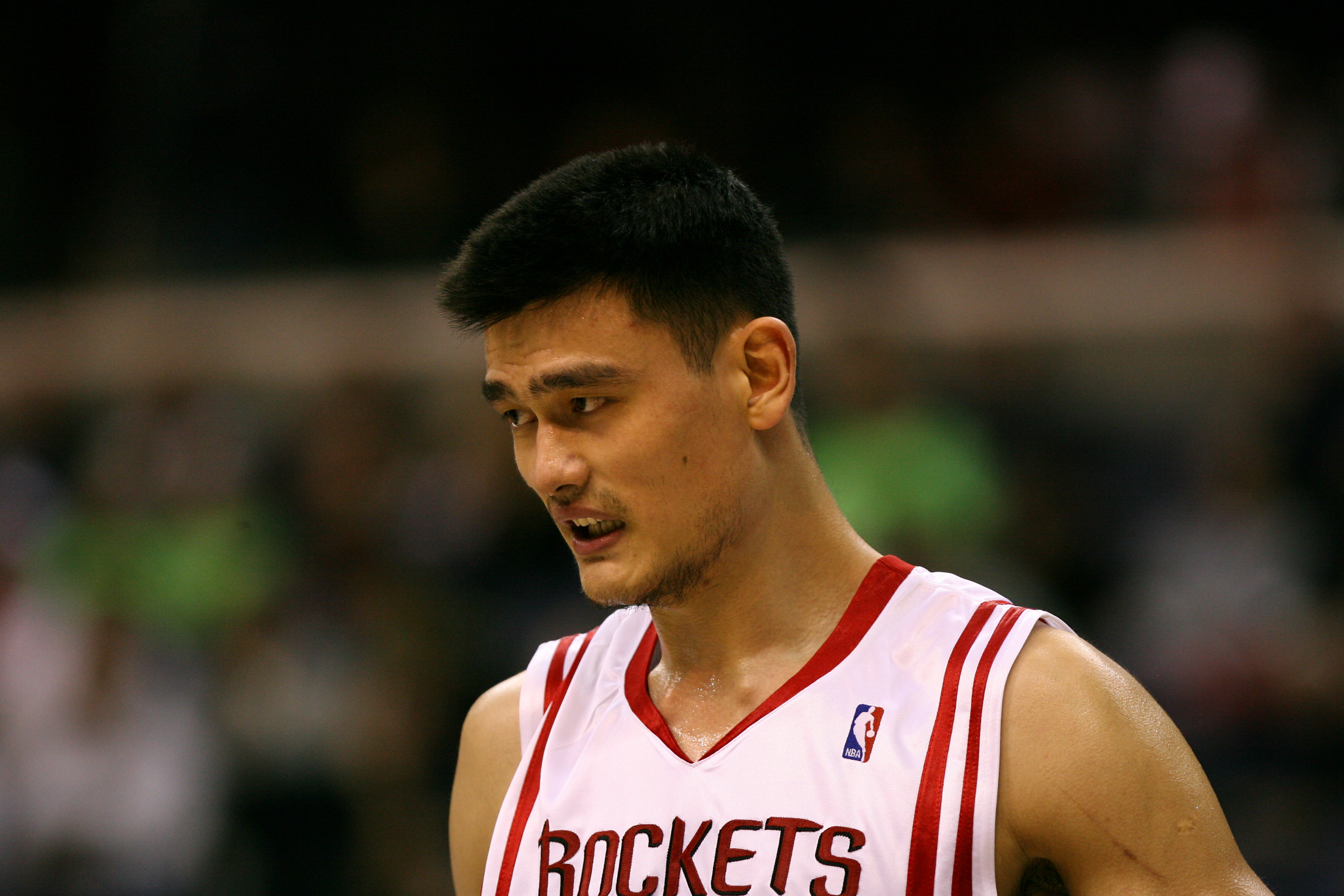 Yao Ming